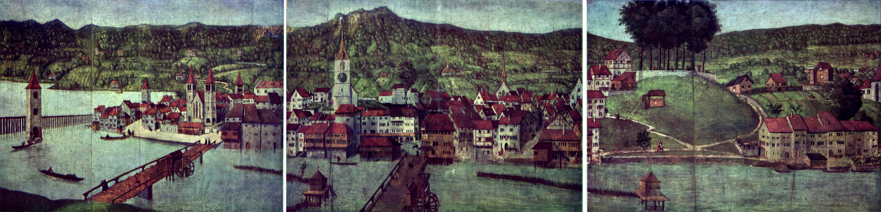 Älteste zuverlässige Darstellung der Stadt Zürich, Ende des 15. Jahrhunderts auf den Altartafeln aus dem Grossmünster in Zürich von Hans Leu d. Ä.. Zustand der Altartafeln vor der Freilegung der Szenen aus dem Martyrium von Felix und Regula 1937, die nach der Reformation übermalt worden waren. Die Tafeln befinden sich heute im Schweizerischen Landesmuseum.